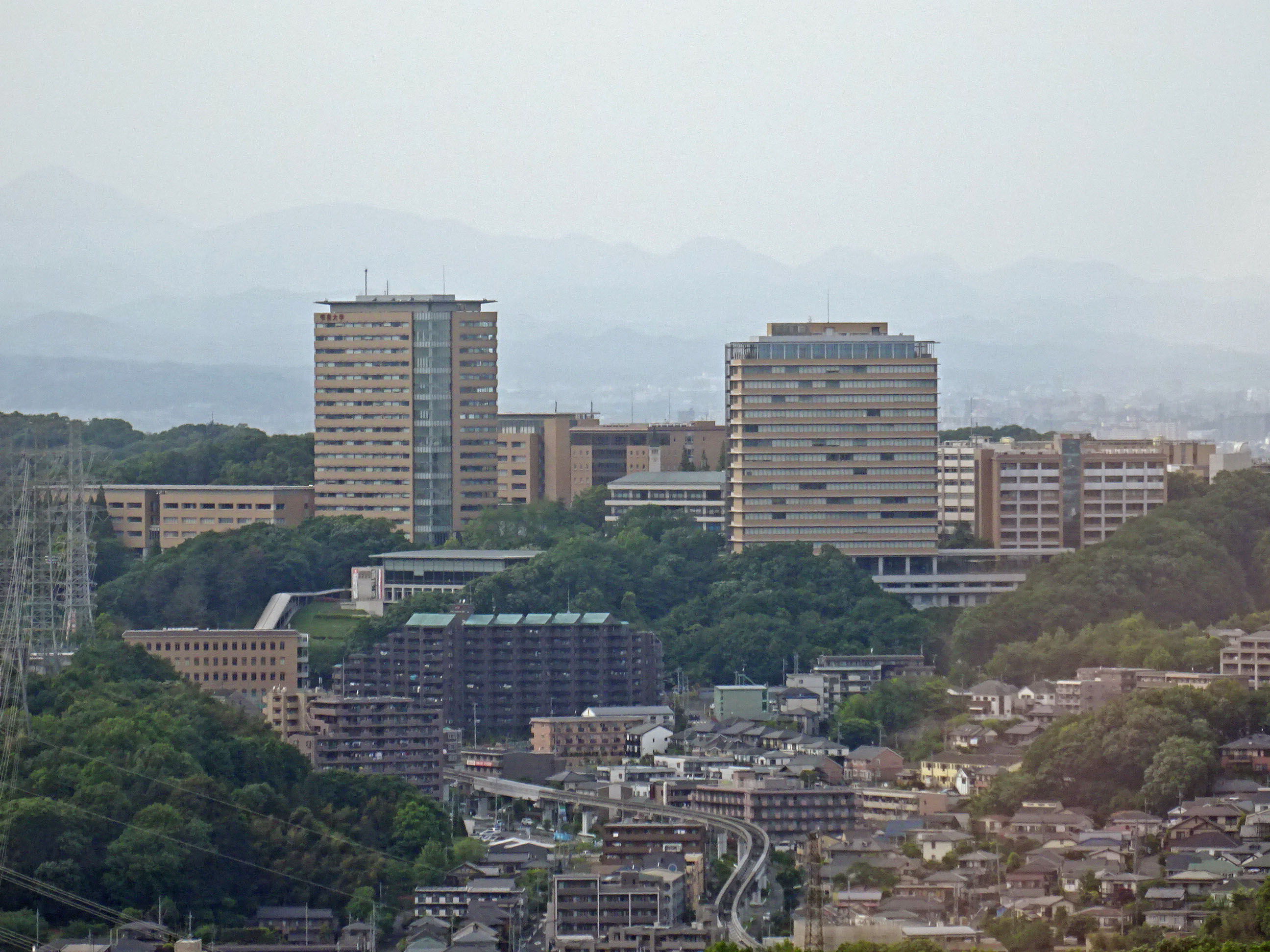 多摩センターのベネッセビルから見る明星大学日野キャンパス。2015年5月6日撮影。